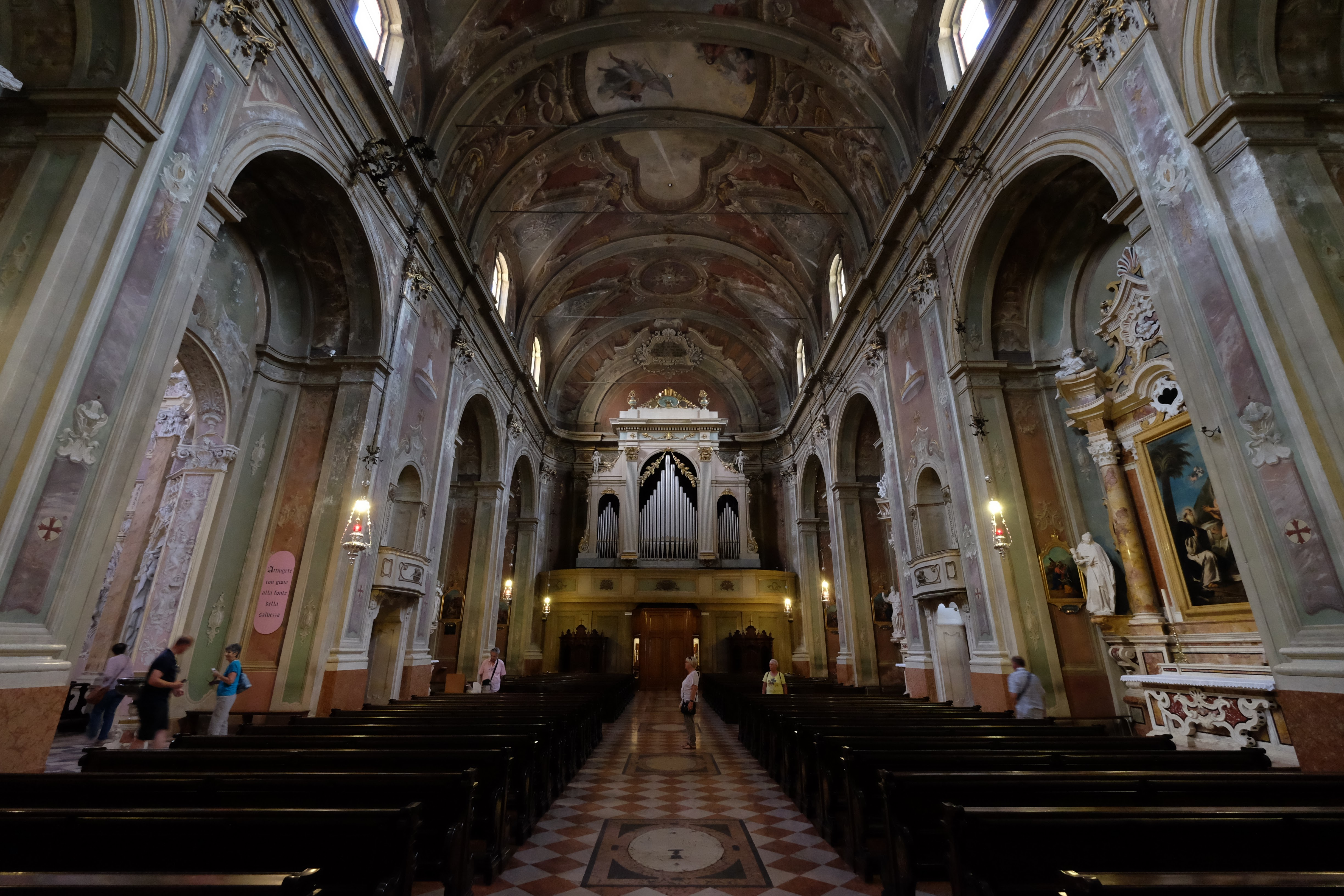 38066 Riva del Garda, Province of Trento, Italy